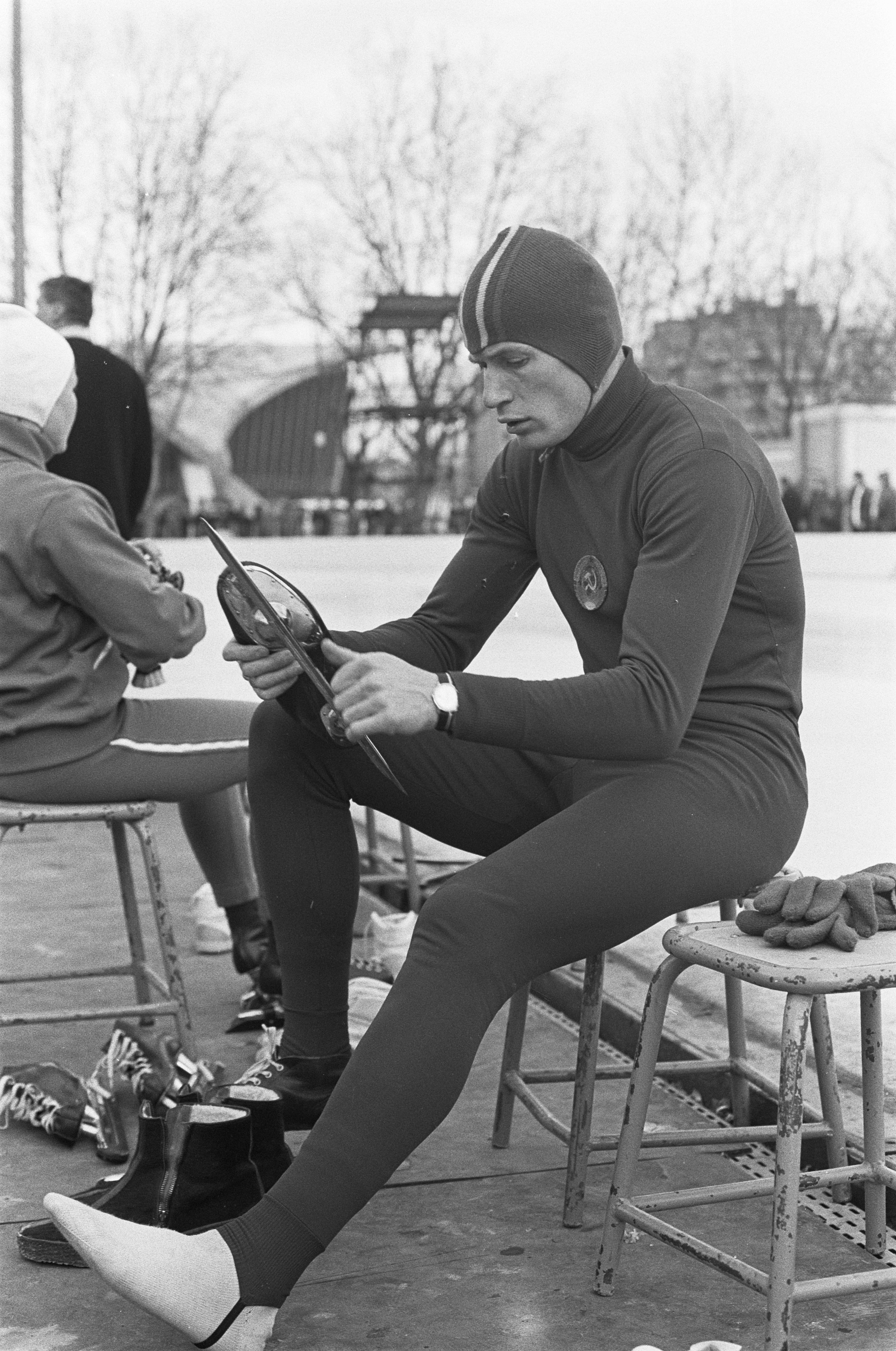 Collectie / Archief : Fotocollectie Anefo Reportage / Serie : [ onbekend ] Beschrijving : Olympische Winterspelen te Grenoble. Schaatser Eduard Matusevich (Sovjet-Unie), kanshebber voor een medaille op de 1500 meter. Datum : 6 februari 1968 Locatie : Grenoble Trefwoorden : schaatsen, sport Persoonsnaam : Matusevich Eduard Instellingsnaam : Olympische Winterspelen Fotograaf : Kroon, Ron / Anefo Auteursrechthebbende : Nationaal Archief Materiaalsoort : Negatief (zwart/wit) Nummer archiefinventaris : bekijk toegang 2.24.01.05 Bestanddeelnummer : 921-0554